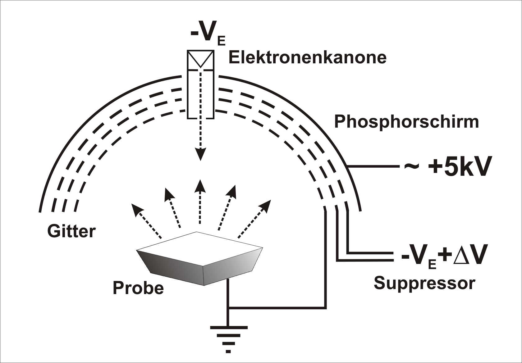 Prinzipskizze eines LEED-Experiments